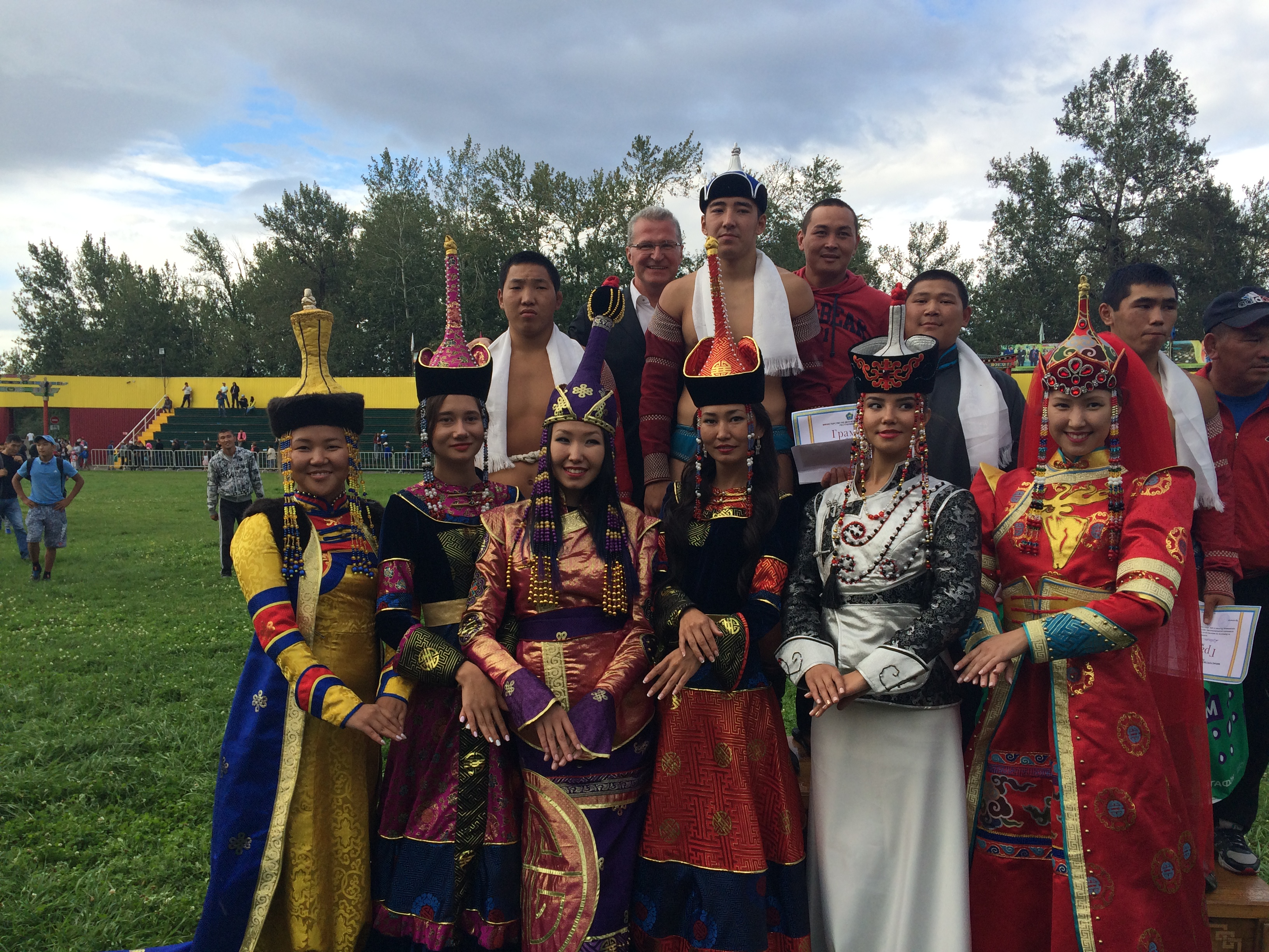 Борцы и девушки-даңгына. 13 августа 2016 Тыва дыл: Мөгелер биле Даңгыналар. Аныяктар аразынга Наадым Хүрежи. 2016ч 8а 13х.